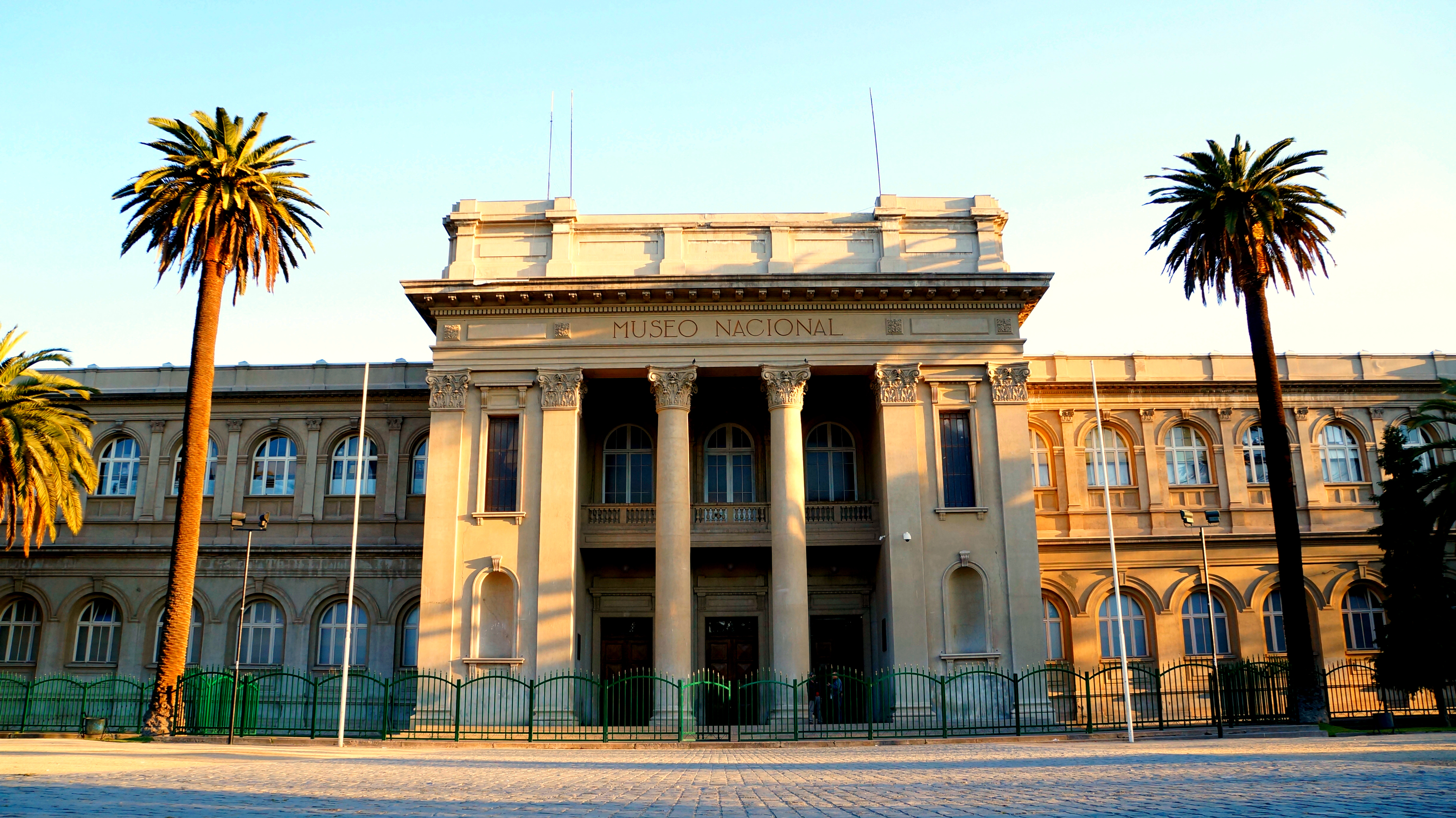 Museo Nacional de Historia Natural This is a photo of a national monument in Chile: 879